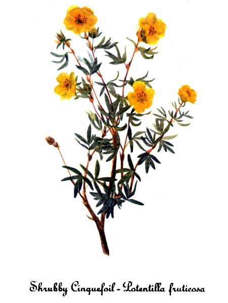 Watercolor painting of Potentilla_fruticosa-2.